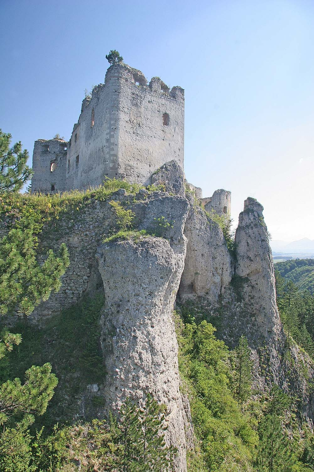 Castle Lietava - Kinižovský palác